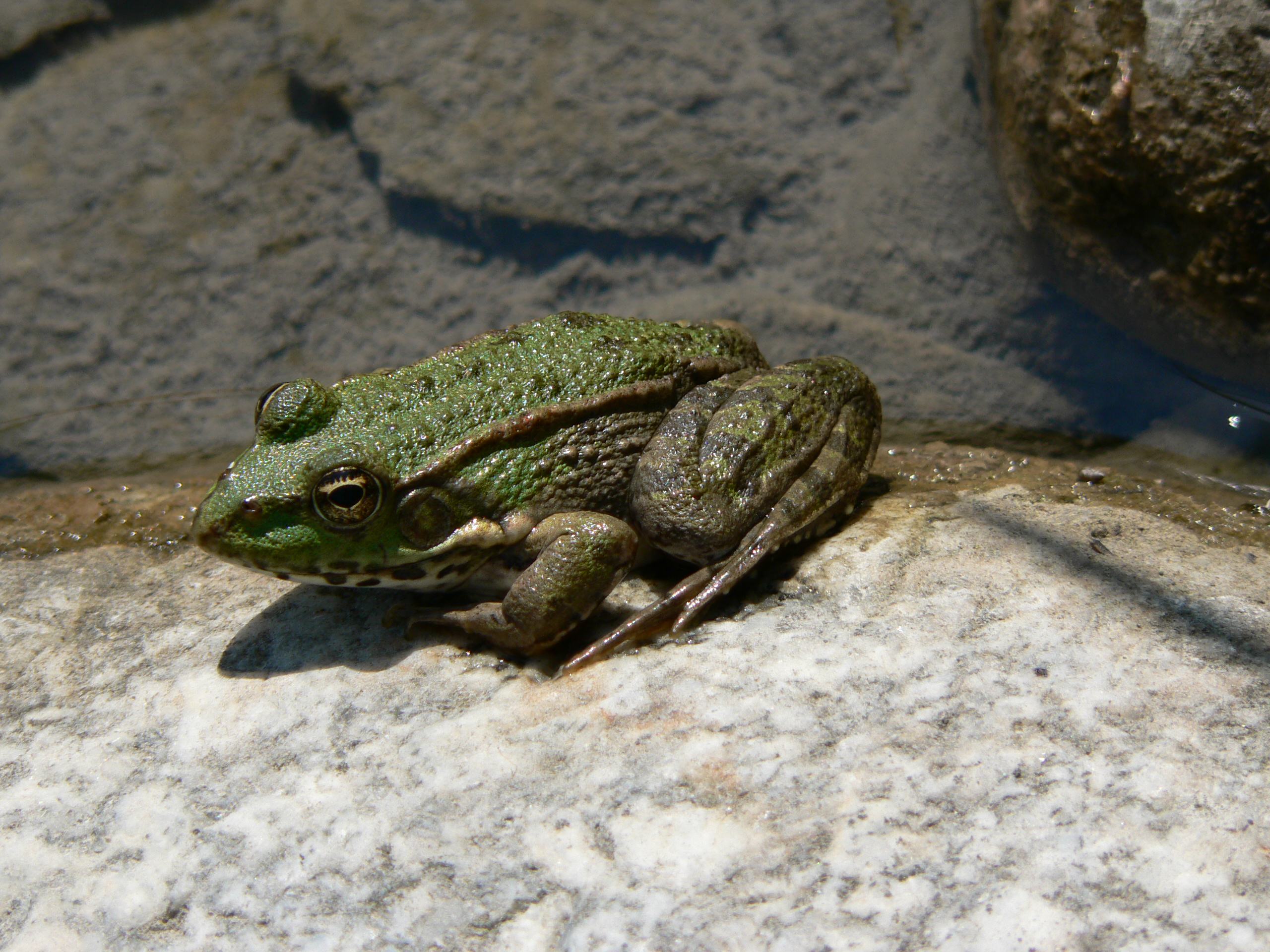 Une grenouille dans le Drac.